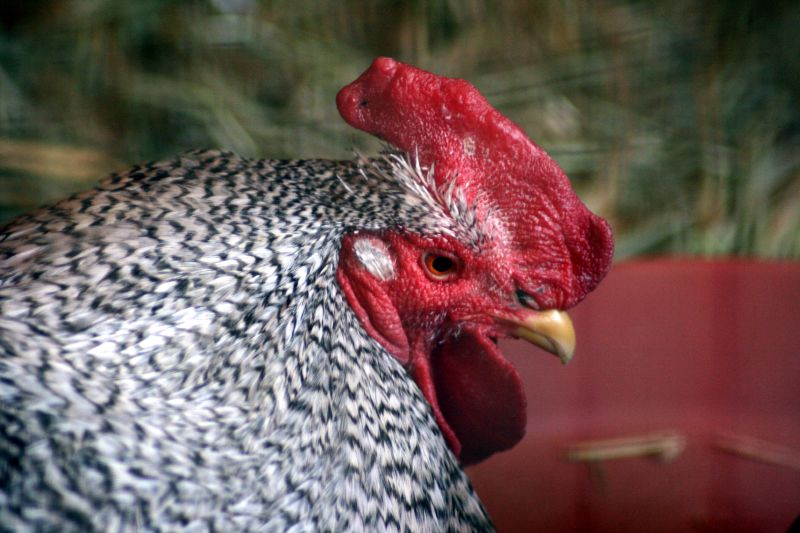 Dominique Chicken